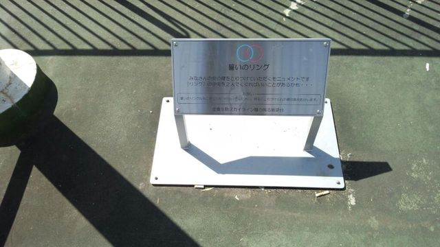 鐘のなる丘展望台にある誓いのリング